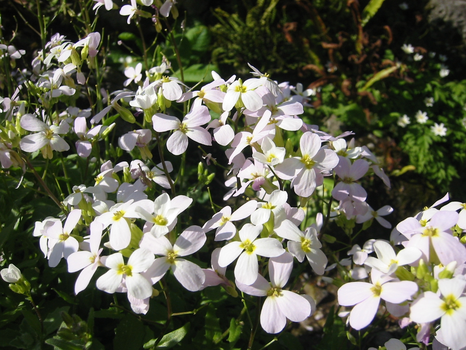 Arabis_alpina; Botanic Garden, Vienna, Austria.